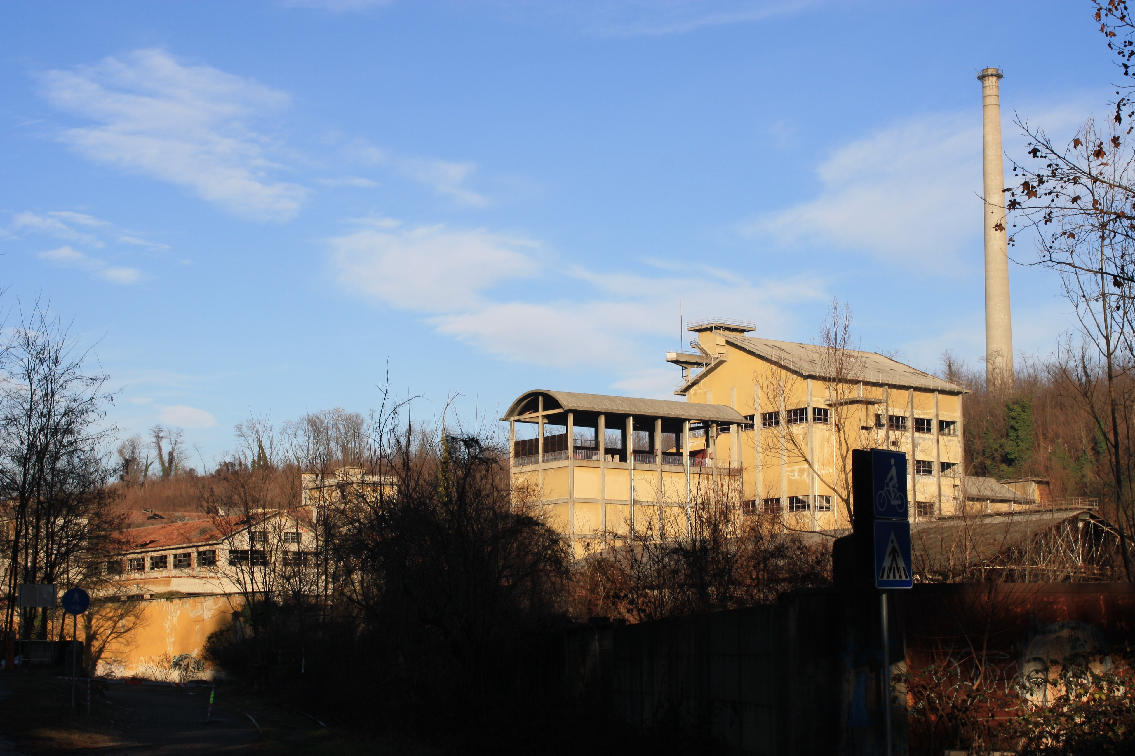 La Cartiera Vita-Meyer a Cairate (VA).